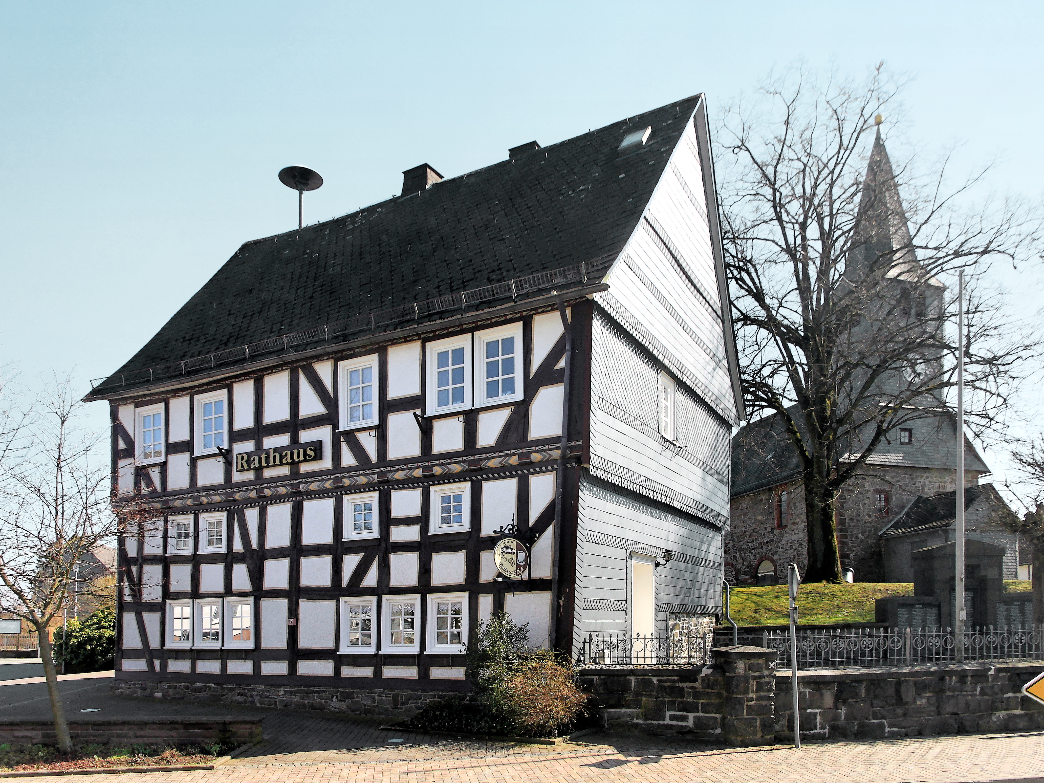 Rathaus und Evangelische Kirche in Bromskirchen (Hessen, Deutschland)